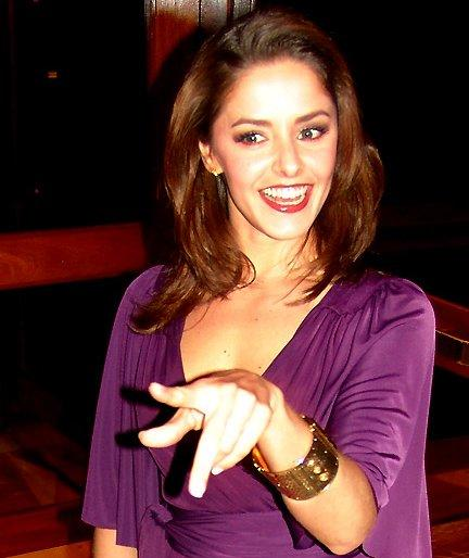 A atriz Bianca Rinaldi